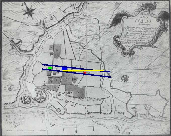 Кампізійная знаходжанне касцёлаў у Гродне ў 18 ст. Мапа - 1759г.